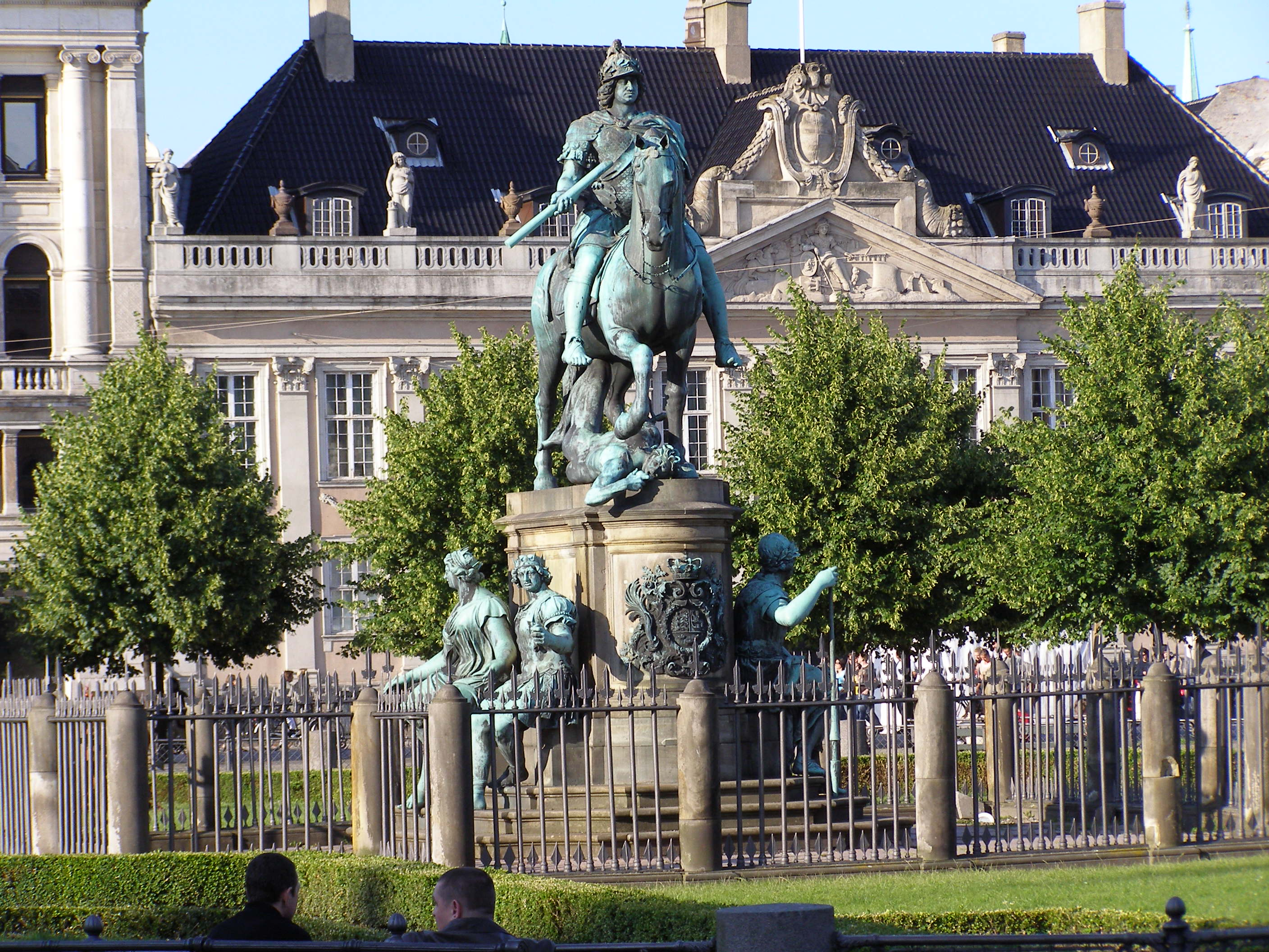 København K, København, Denmark